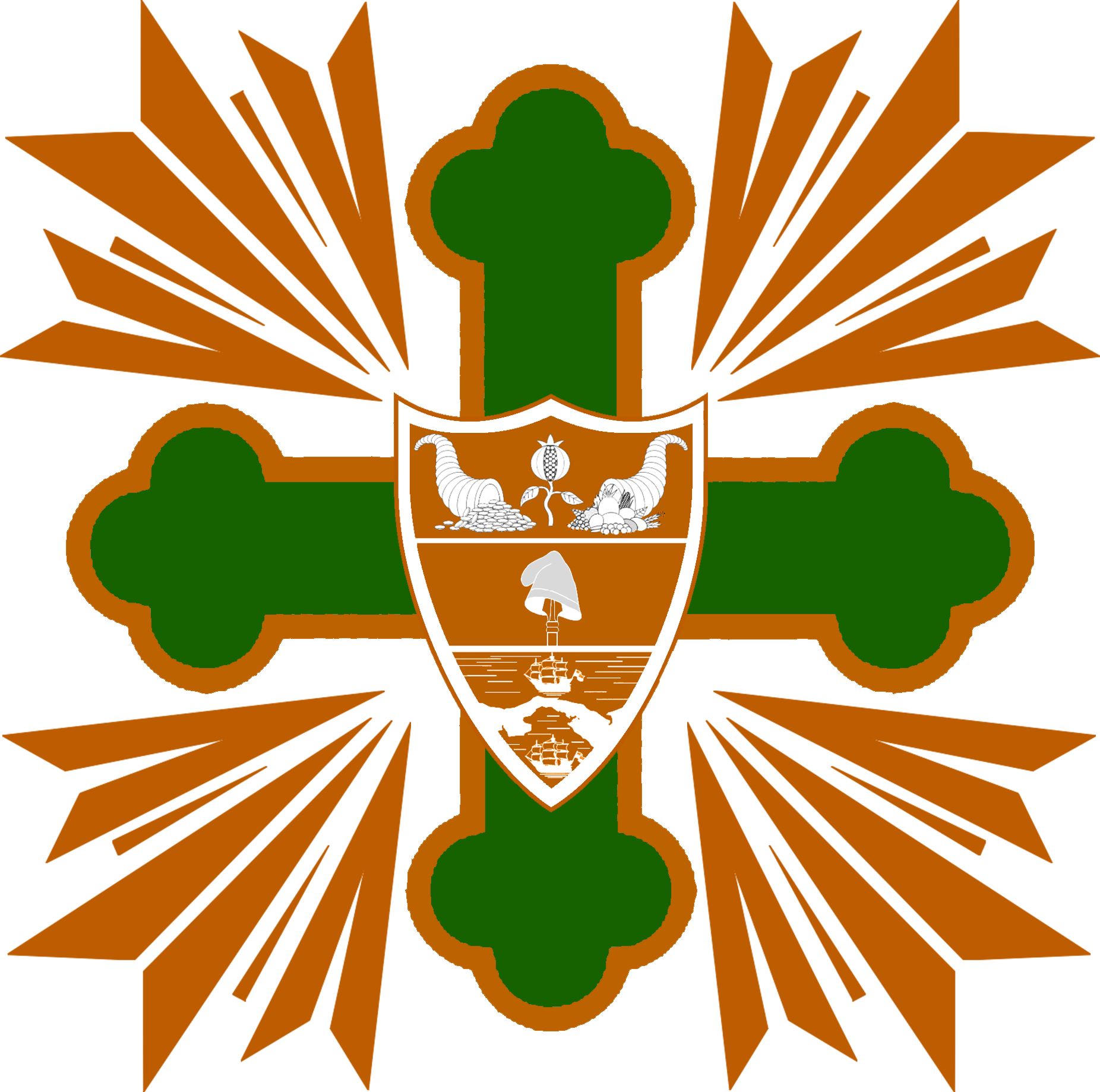 Escudo Orden de San Carlos